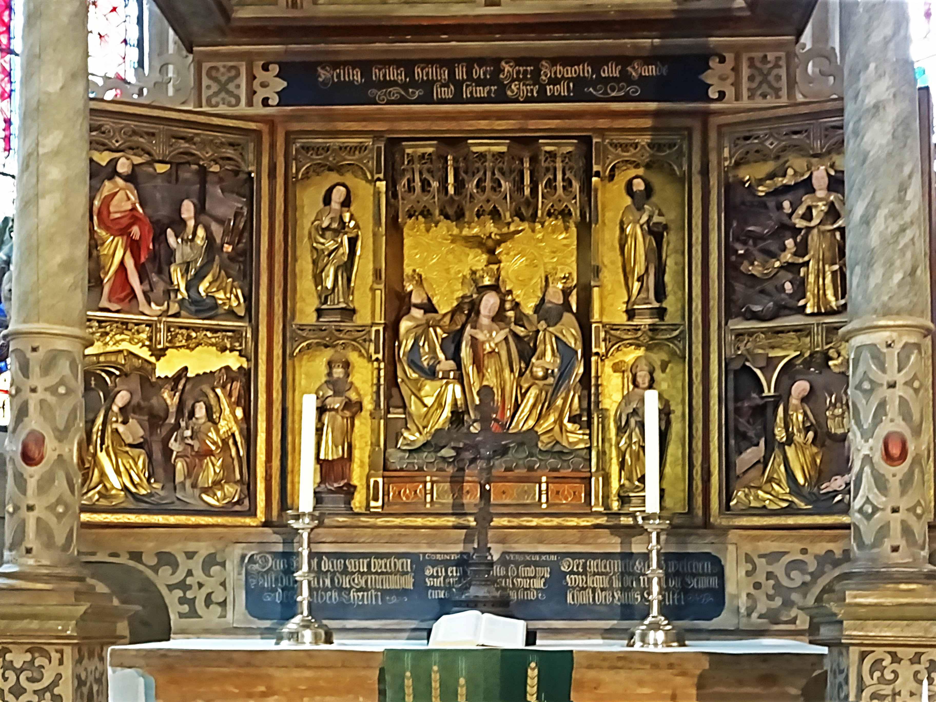 vierflügliger Schnitzaltar in der Divi-Blasii-Kirche (Mühlhausen, Thüringen)